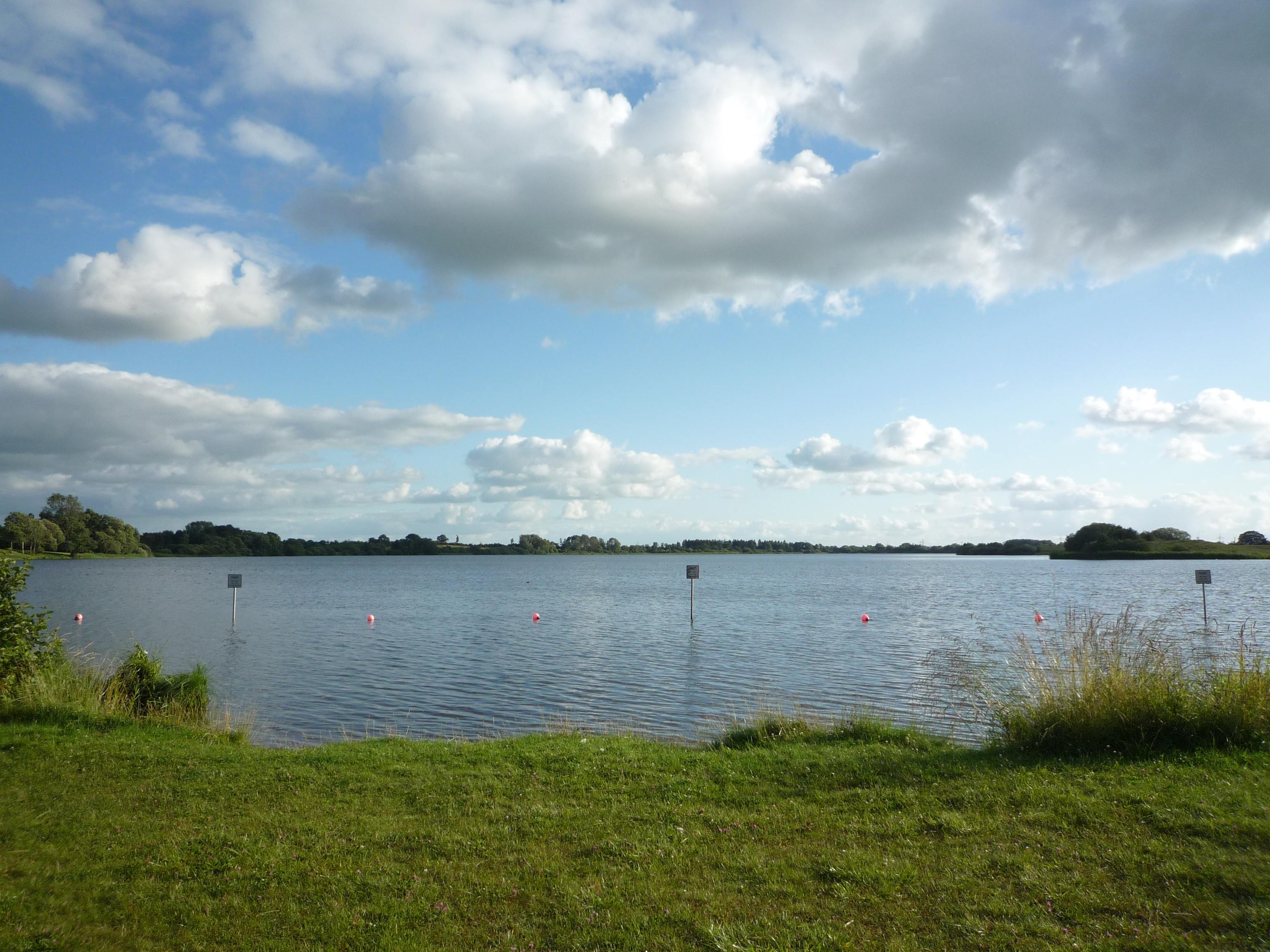 Der Arenholzer See; fotografiert von der Badestelle in Lürschau aus